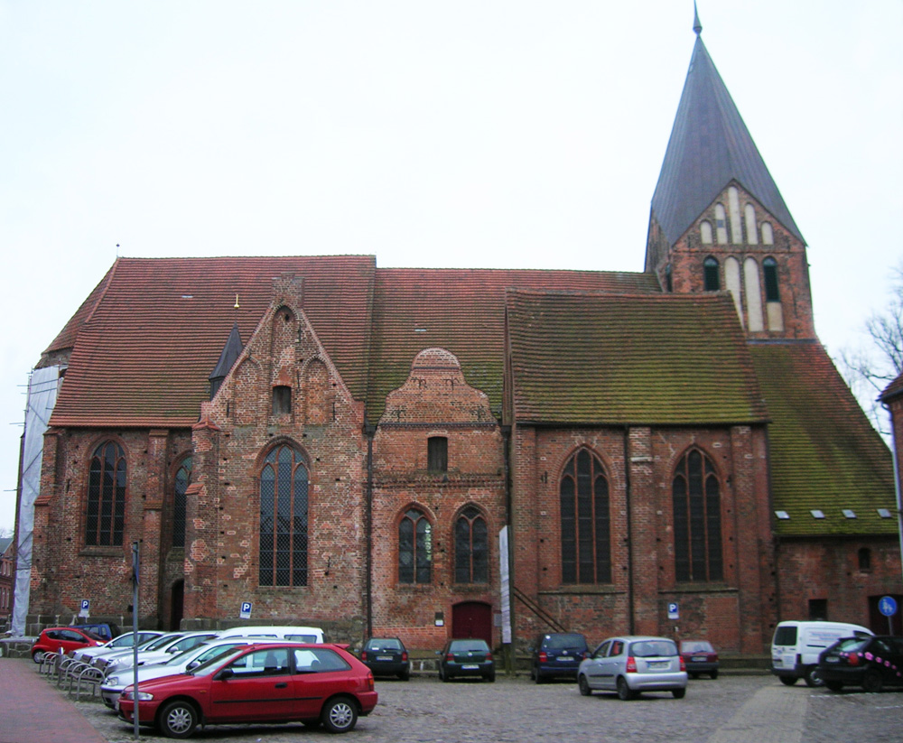 Stadtkirche Gadebusch, Gesamtansicht